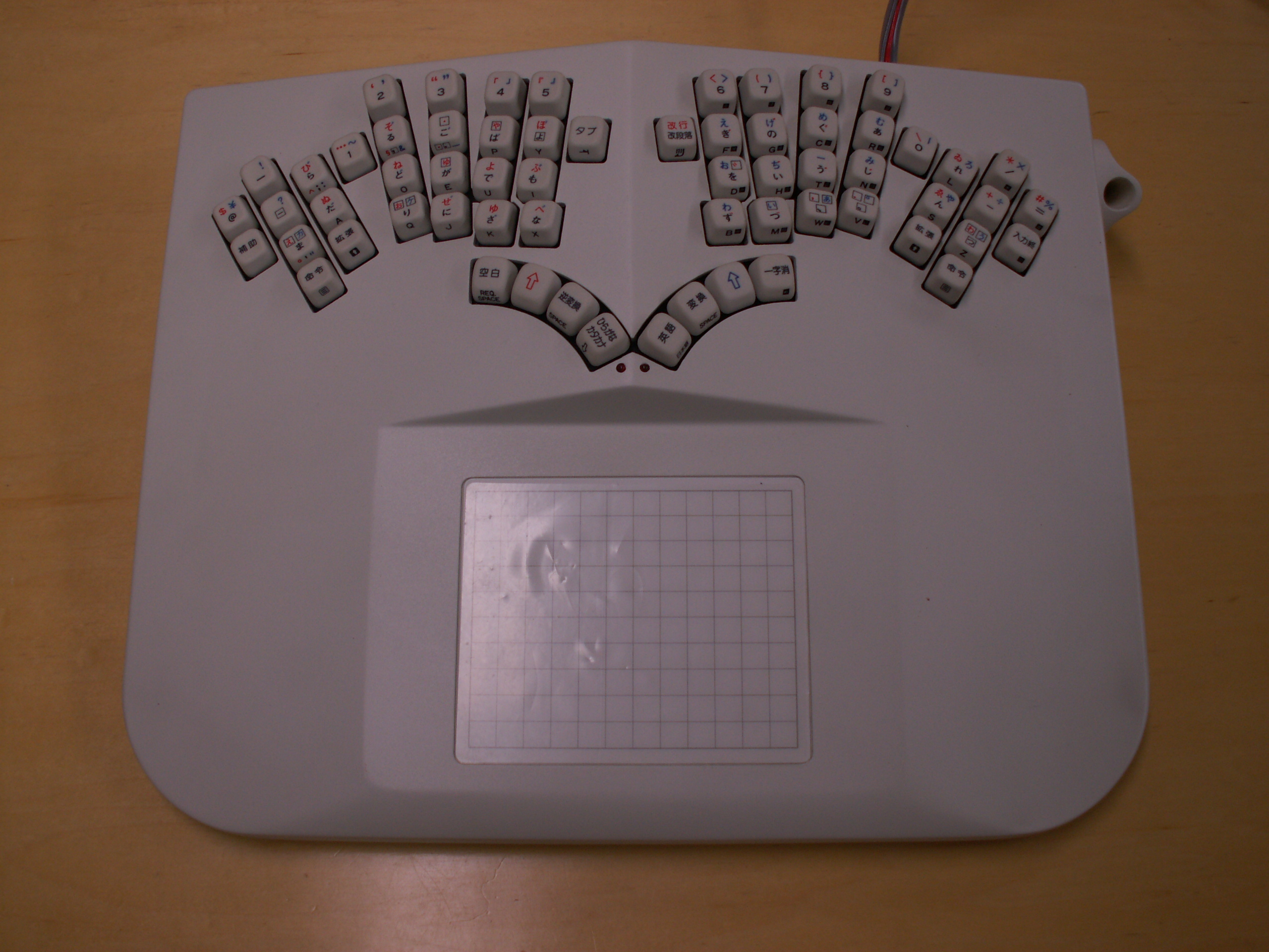 TRONキーボード 沖製 上面